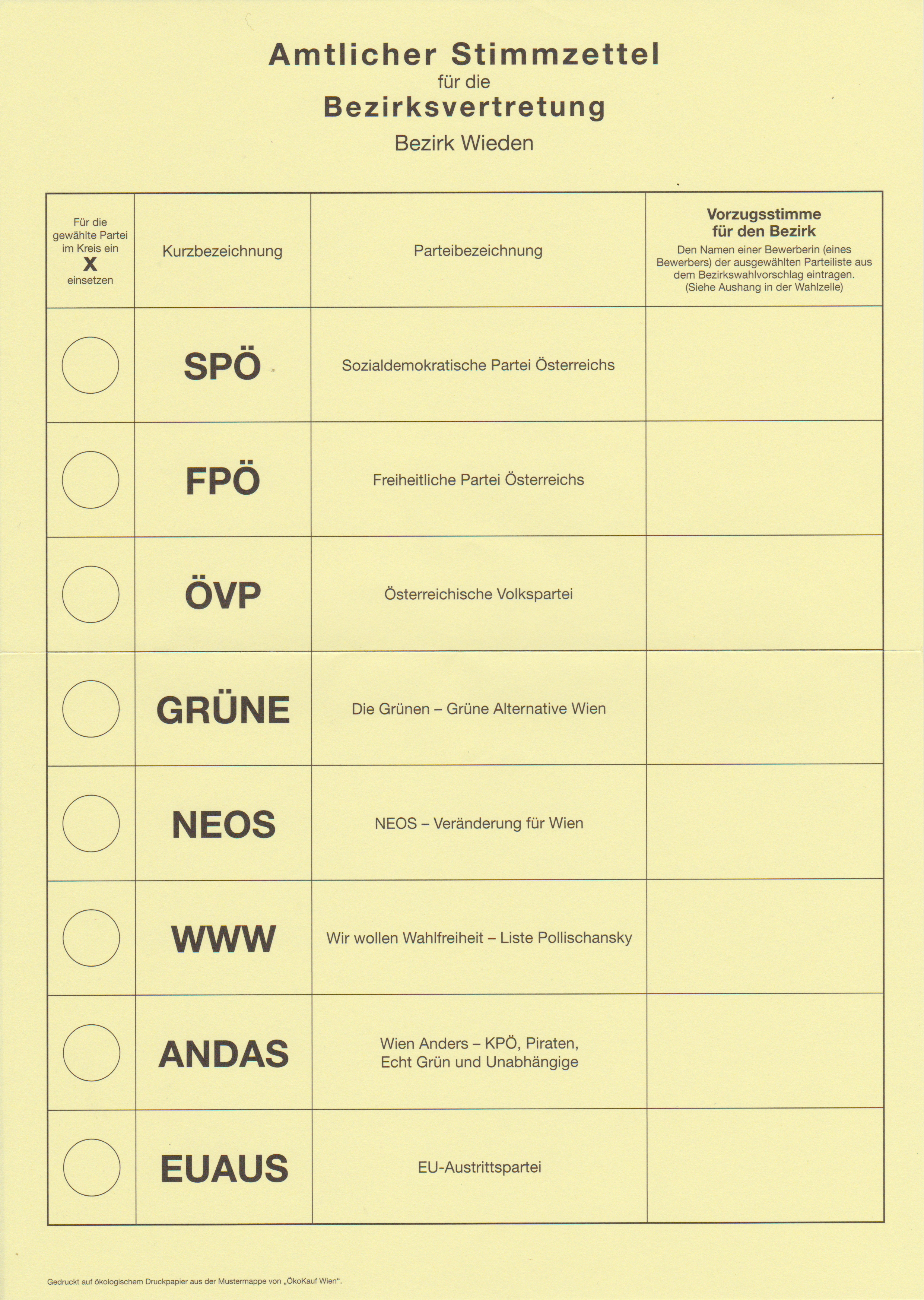 Amtlicher Stimmzettel für die Bezirksvertretung Bezirk Wieden (2015)